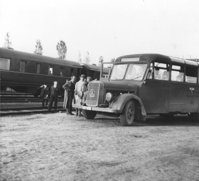 Sonderzug der Einwandererzentralstelle Sonderzug der Einwanderungszentralstelle zur Durchschleusung der Umsiedler: mit Omnibussen werden die Umsiedler an den Sonderzug herangebracht